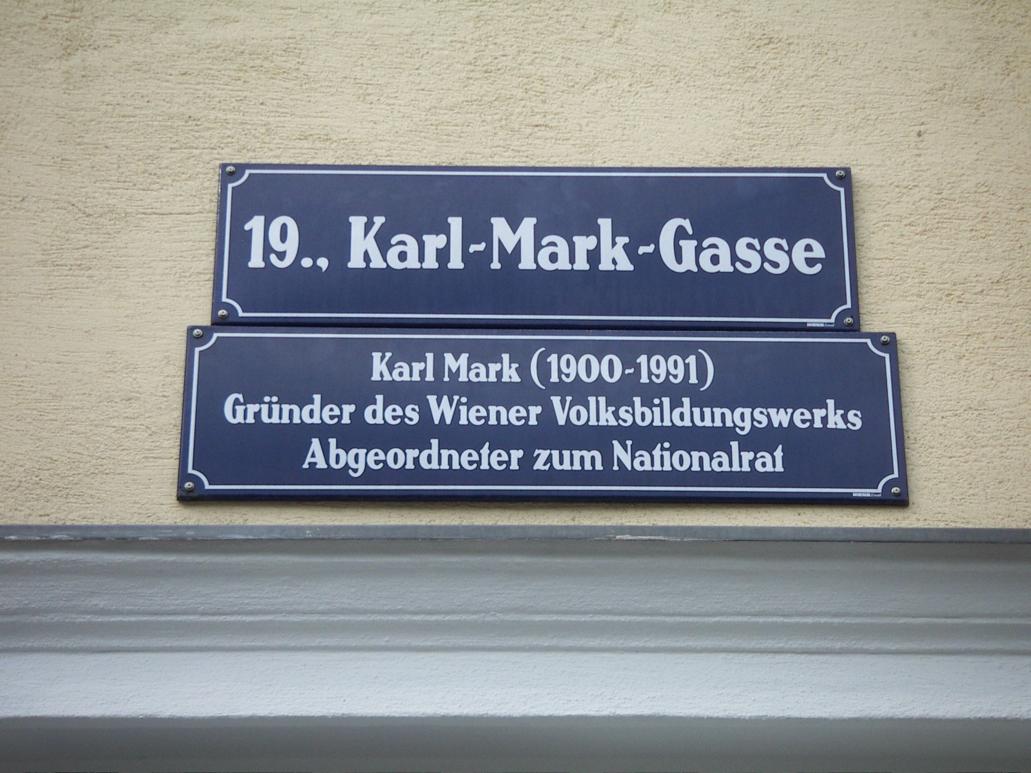 Karl-Mark-Gasse, Karl Mark 1900 - 1991, 1190 Vienna